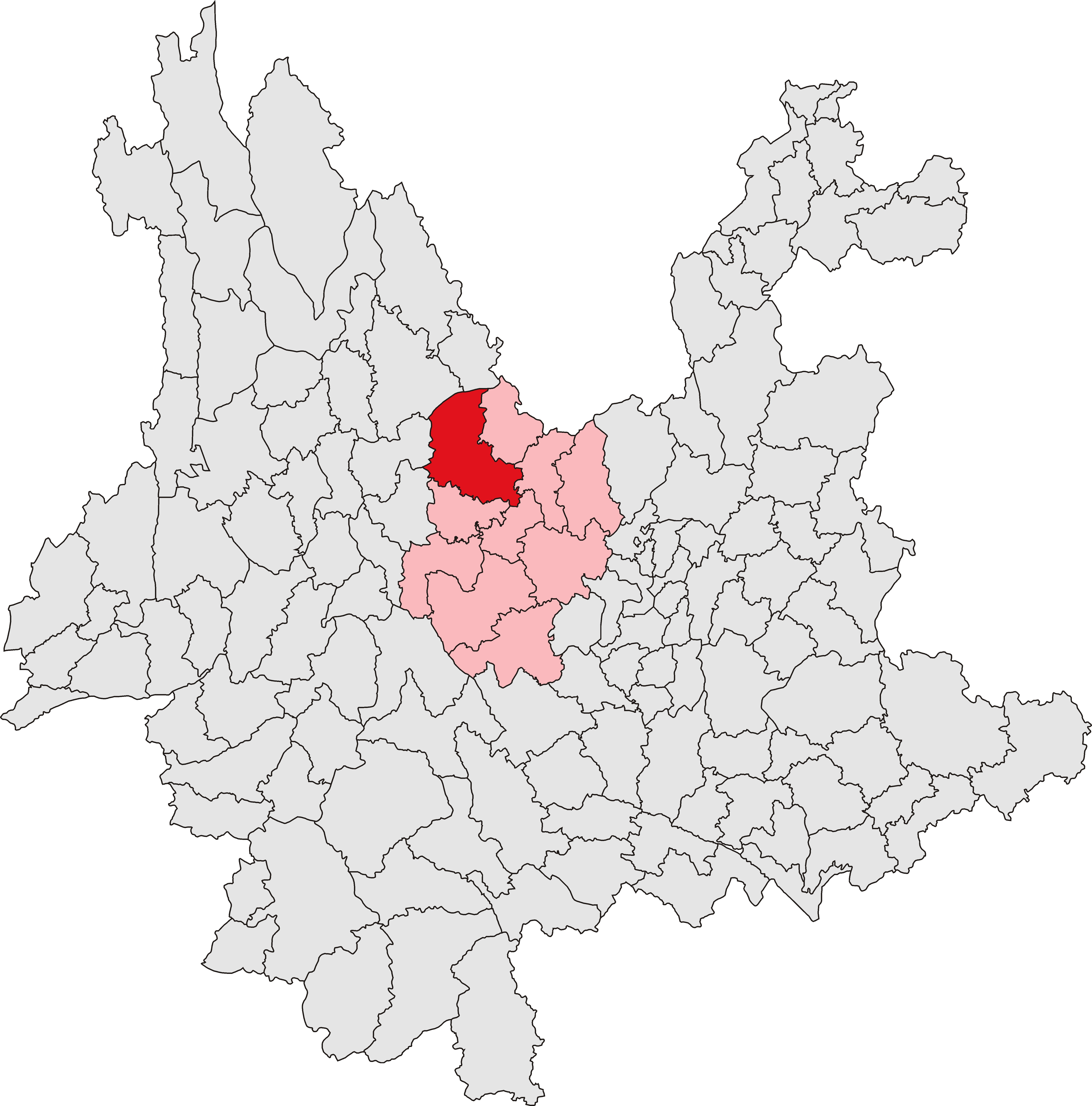 中文（中国大陆）: 大姚县位置图